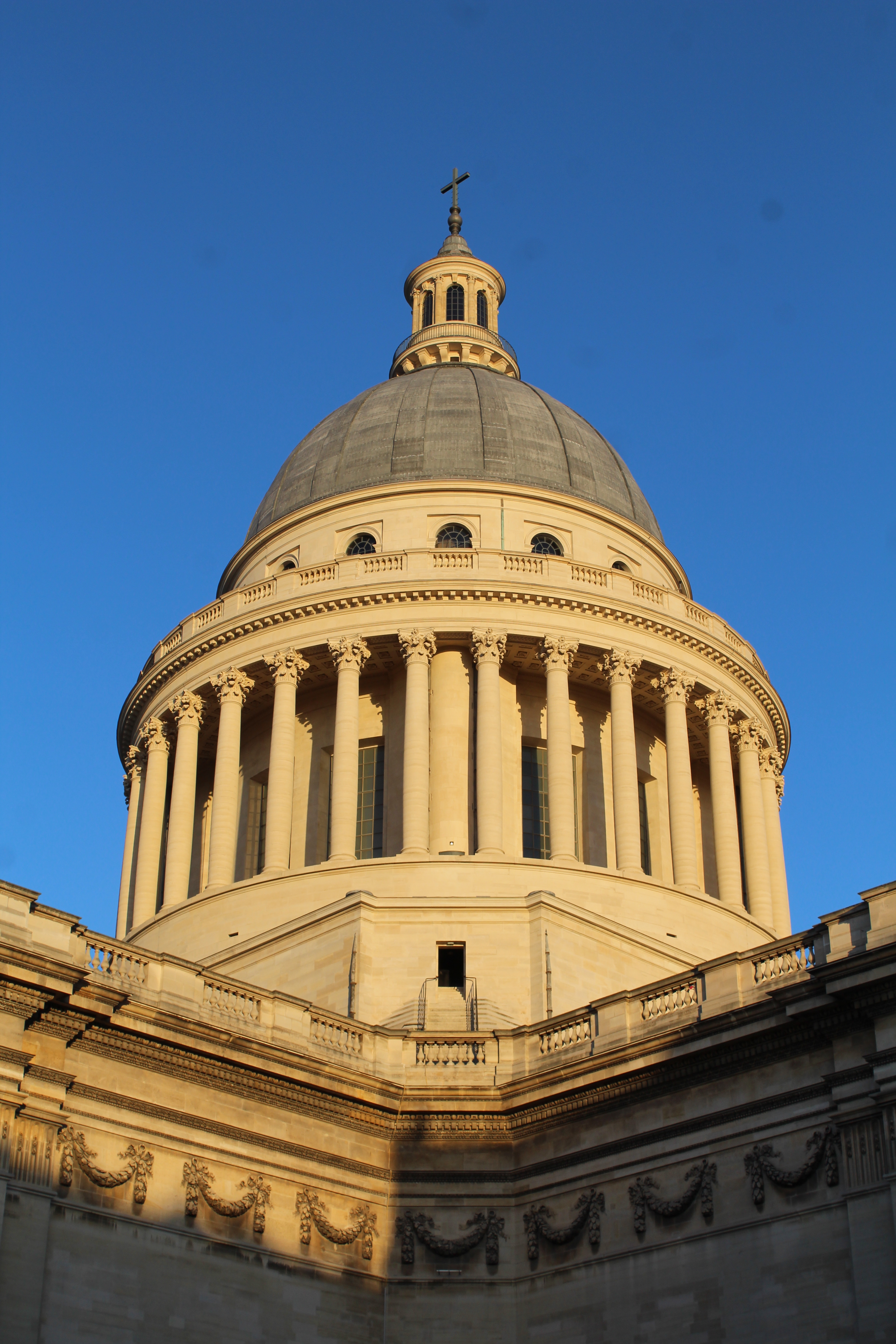 Dôme du Panthéon, Paris.